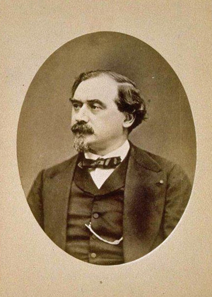 Marie-Edmond Valentin. Meyer, Antoine. Photographe. Bibliothèque nationale et universitaire de Strasbourg